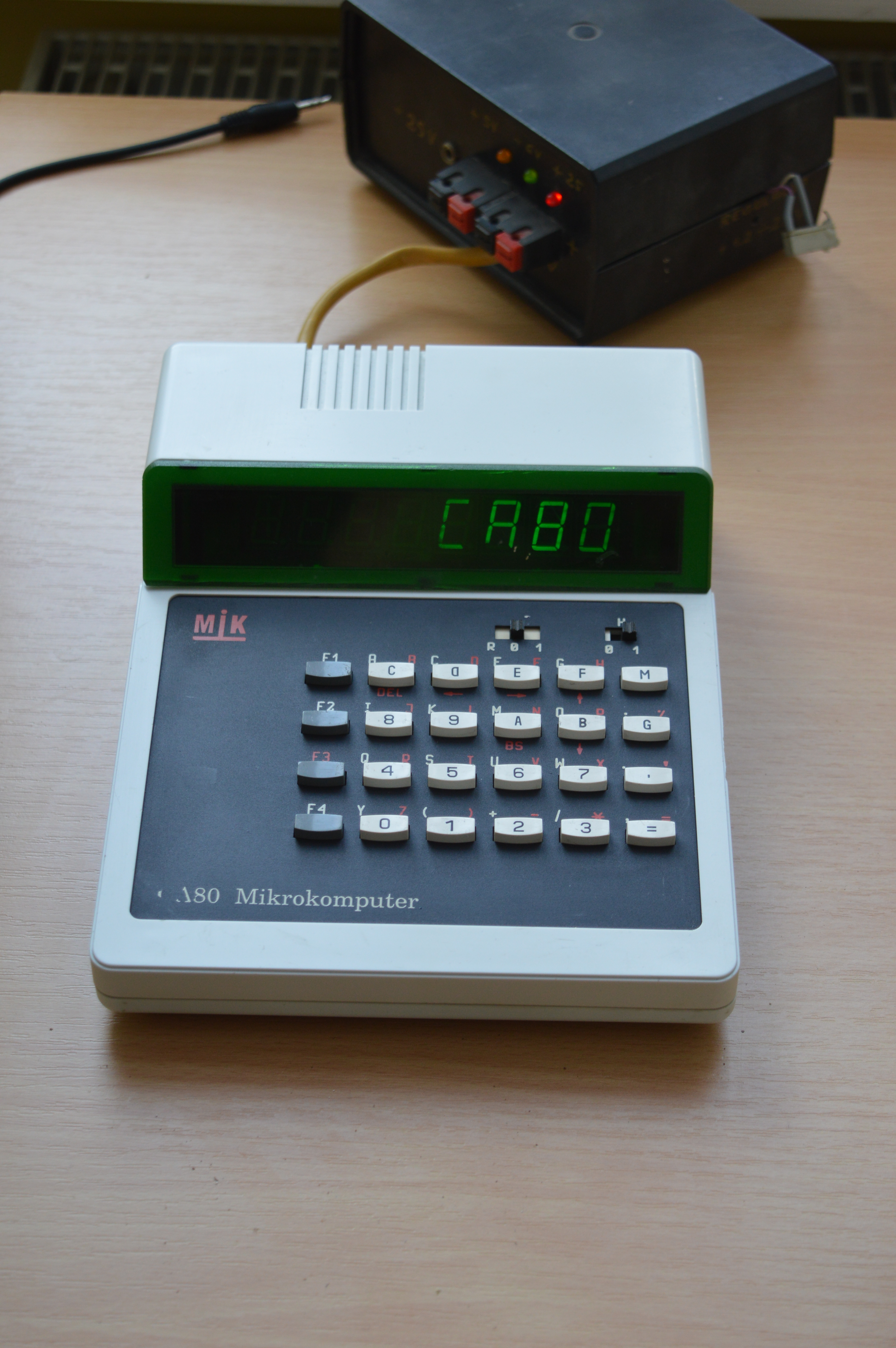 Polish MIK CA80 microcomputer